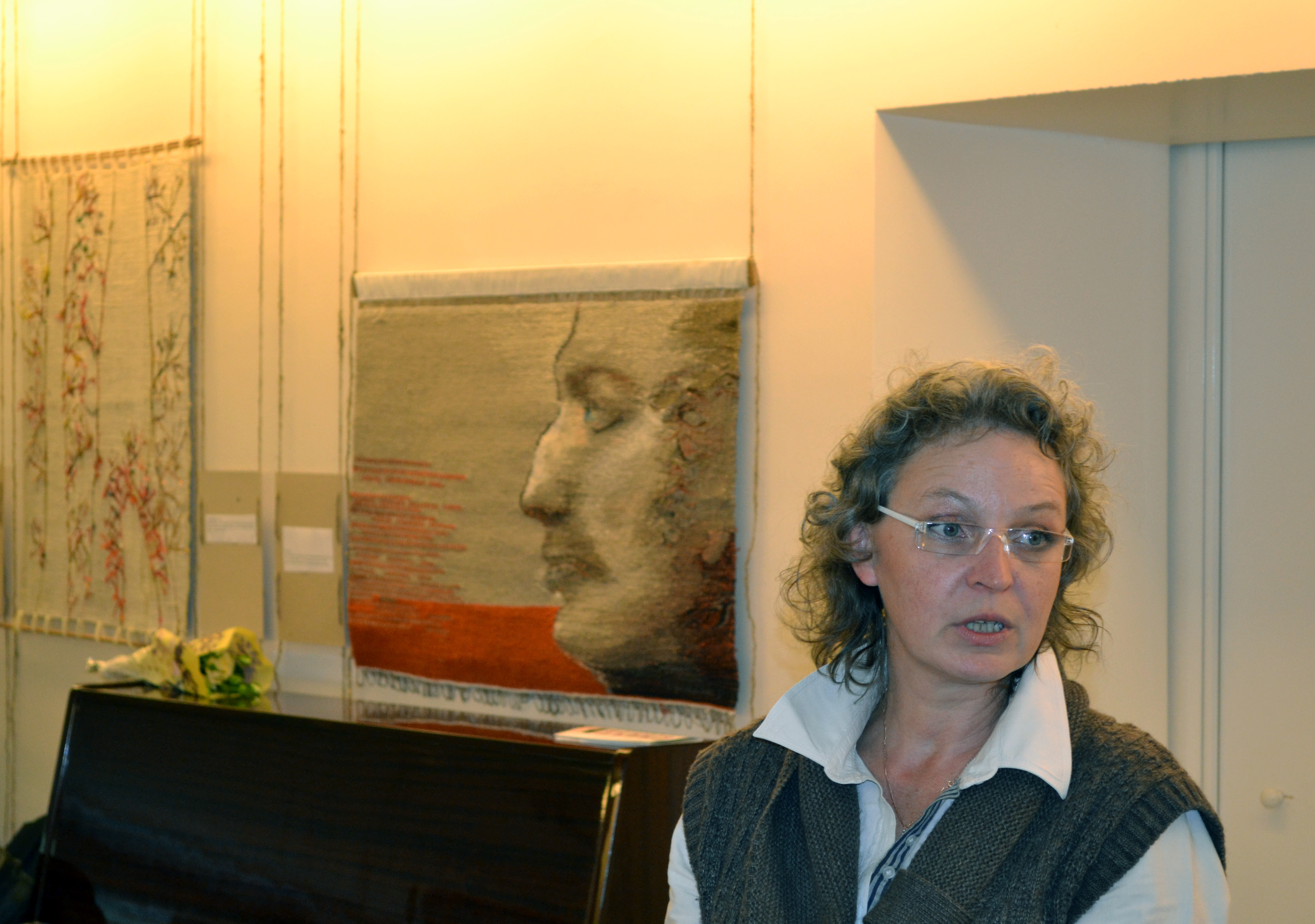 Беларуская (тарашкевіца): Сьвятлана Баранкоўская на адкрыцьці выставы габэленаў у Цэнтральнай бібліятэцы Таліну.